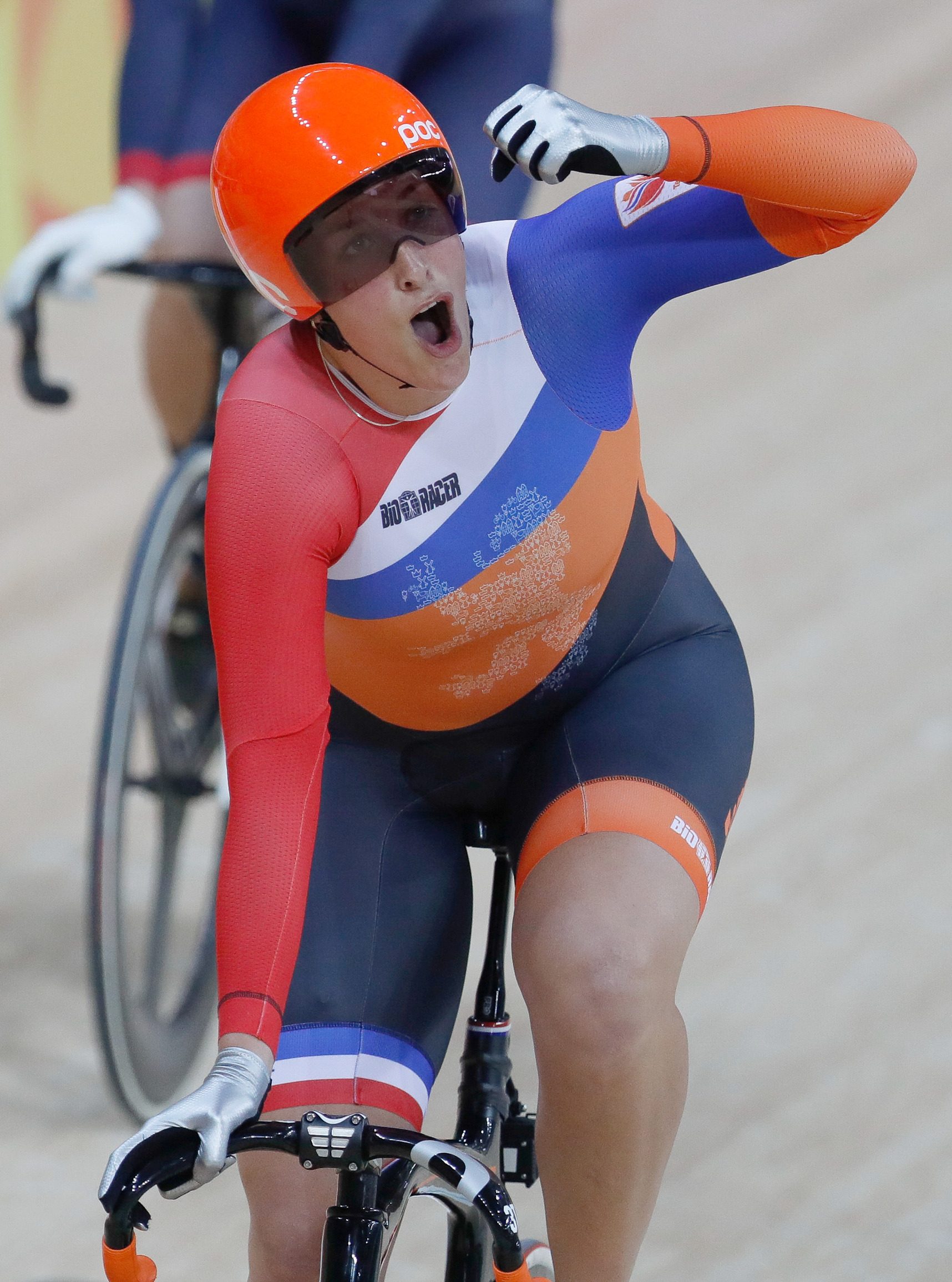 Rio de Janeiro - A holandesa Elis Ligtlee ganha medalha de ouro ao vencer a corrida Keirin de ciclismo no Velódromo dos Jogos Rio 2016, no Parque Olímpico.